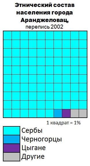 Этнический состав населения города Аранджеловац (2002)